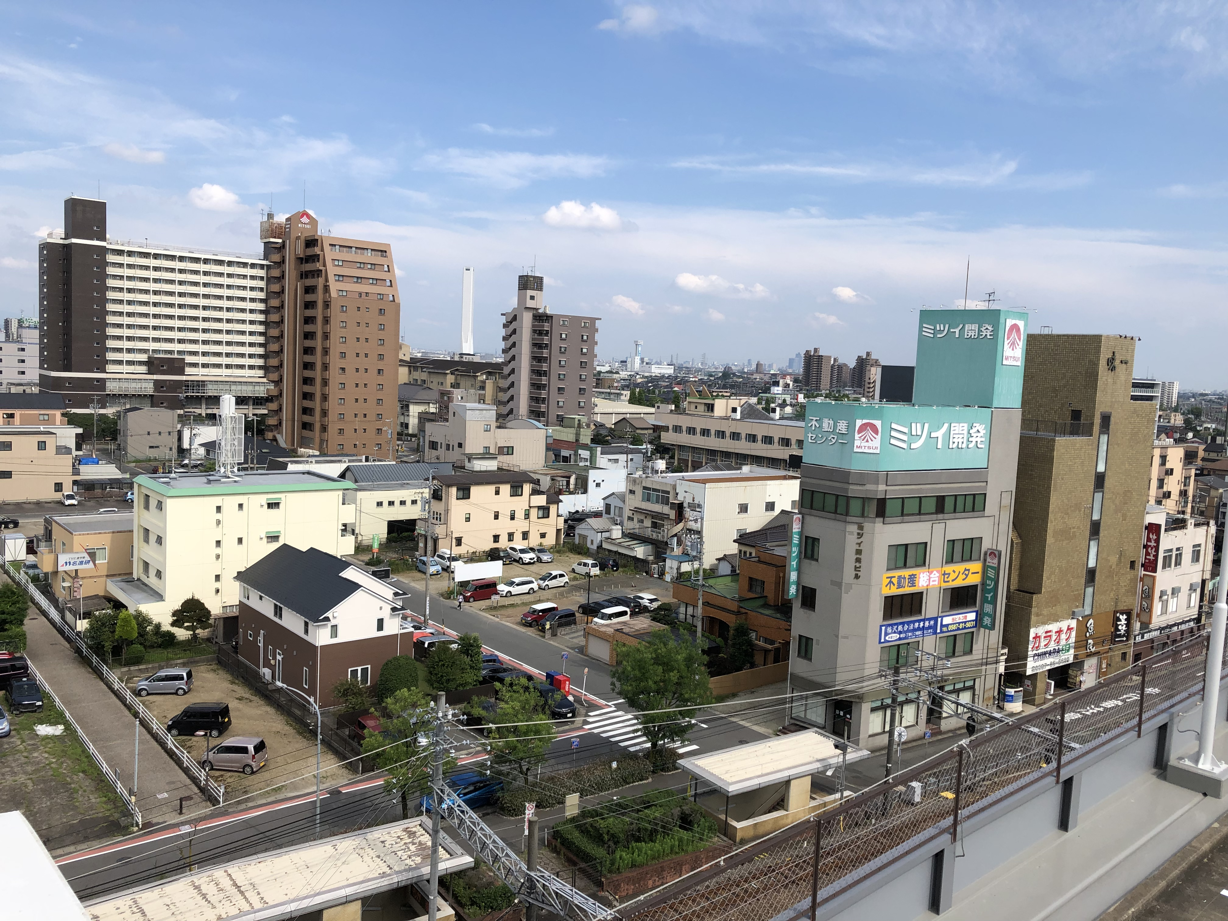 国府宮駅周辺のビル